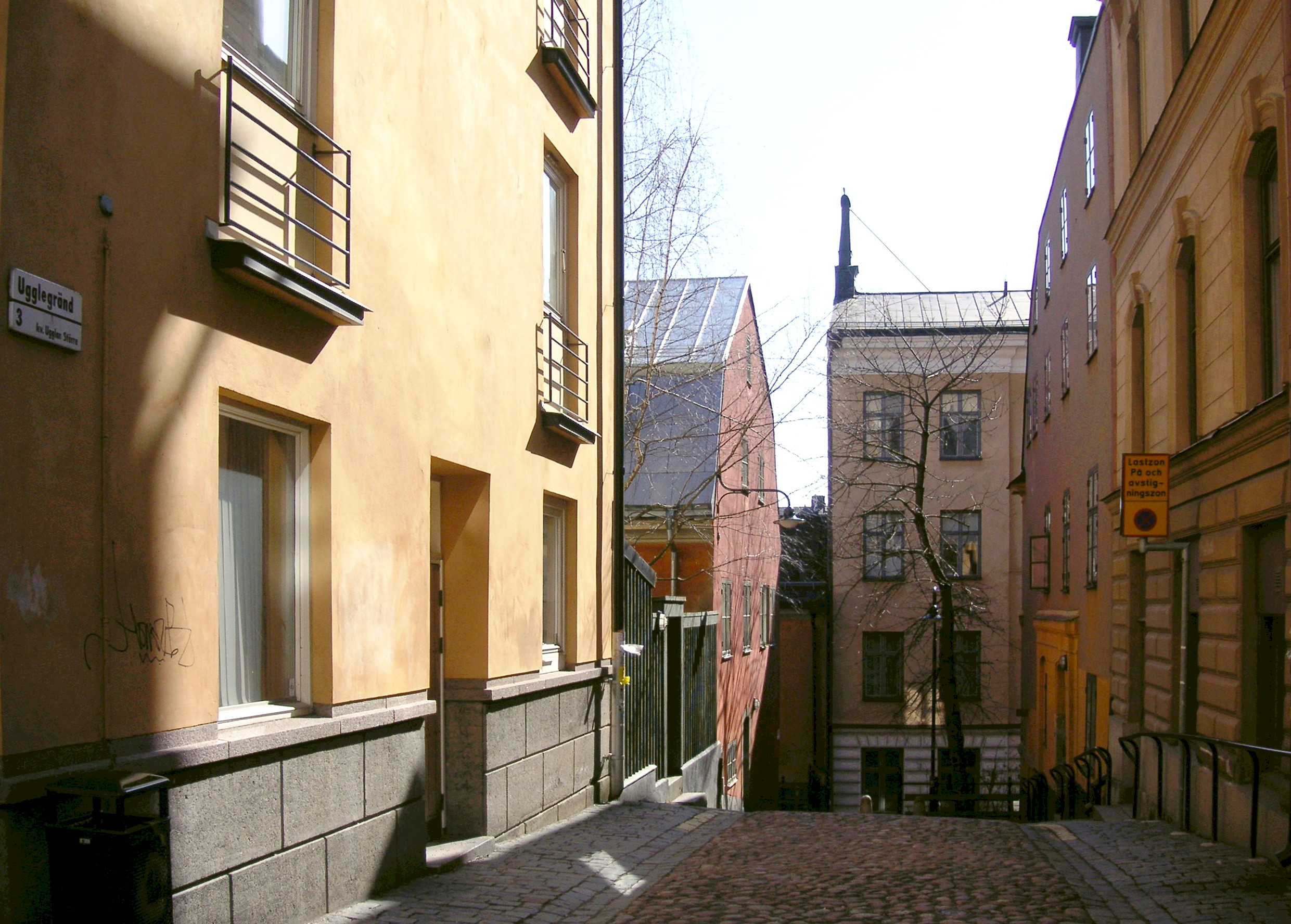 Ugglegränd sedd från Tavastgatan, t.v. ligger Kvarteret Ugglan större